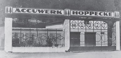 Das HOPPECKE Batterien Werk 1927